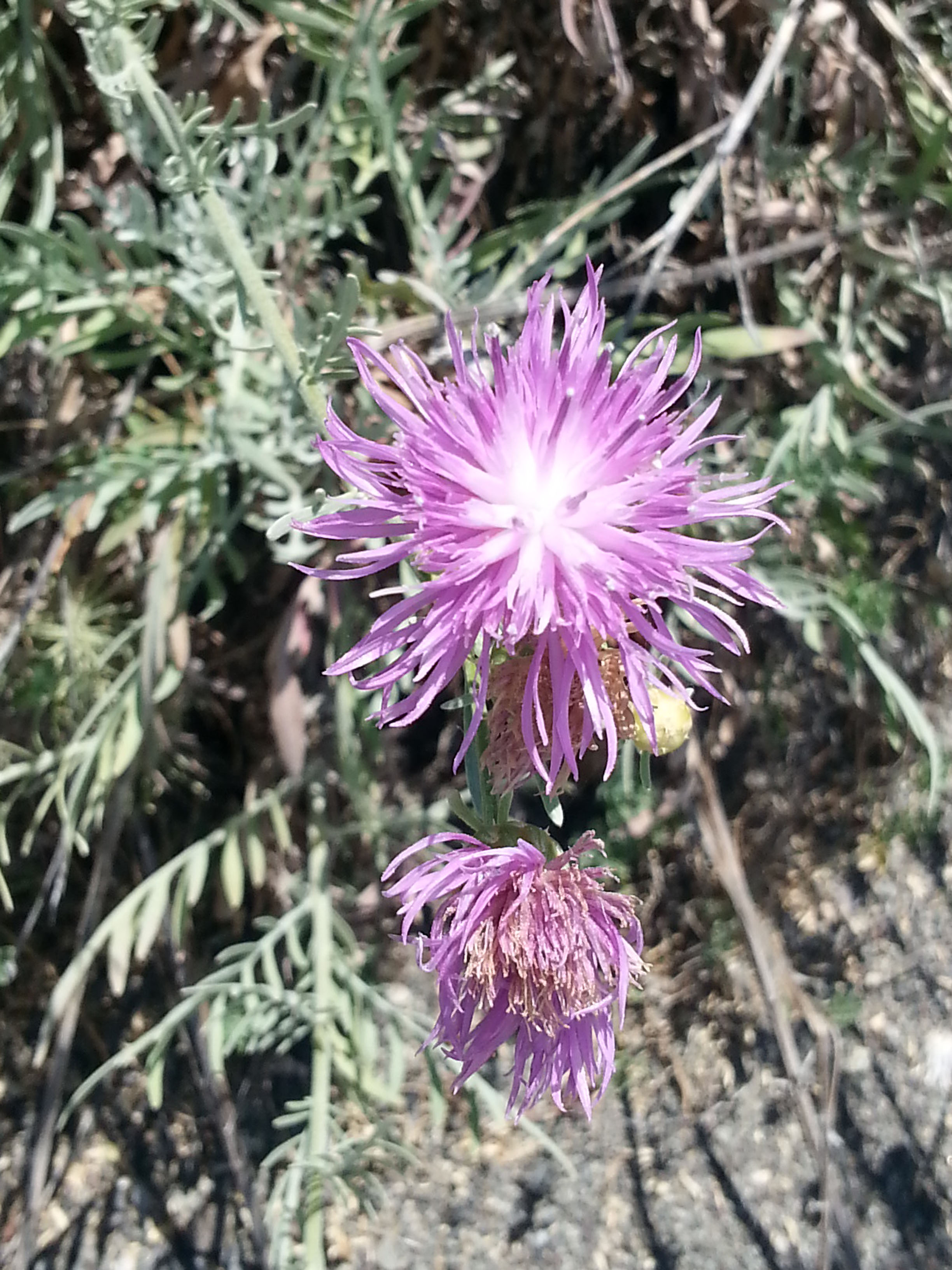 Centaurea aeolica Guss. ex Lojac. Salina (isole Eolie)